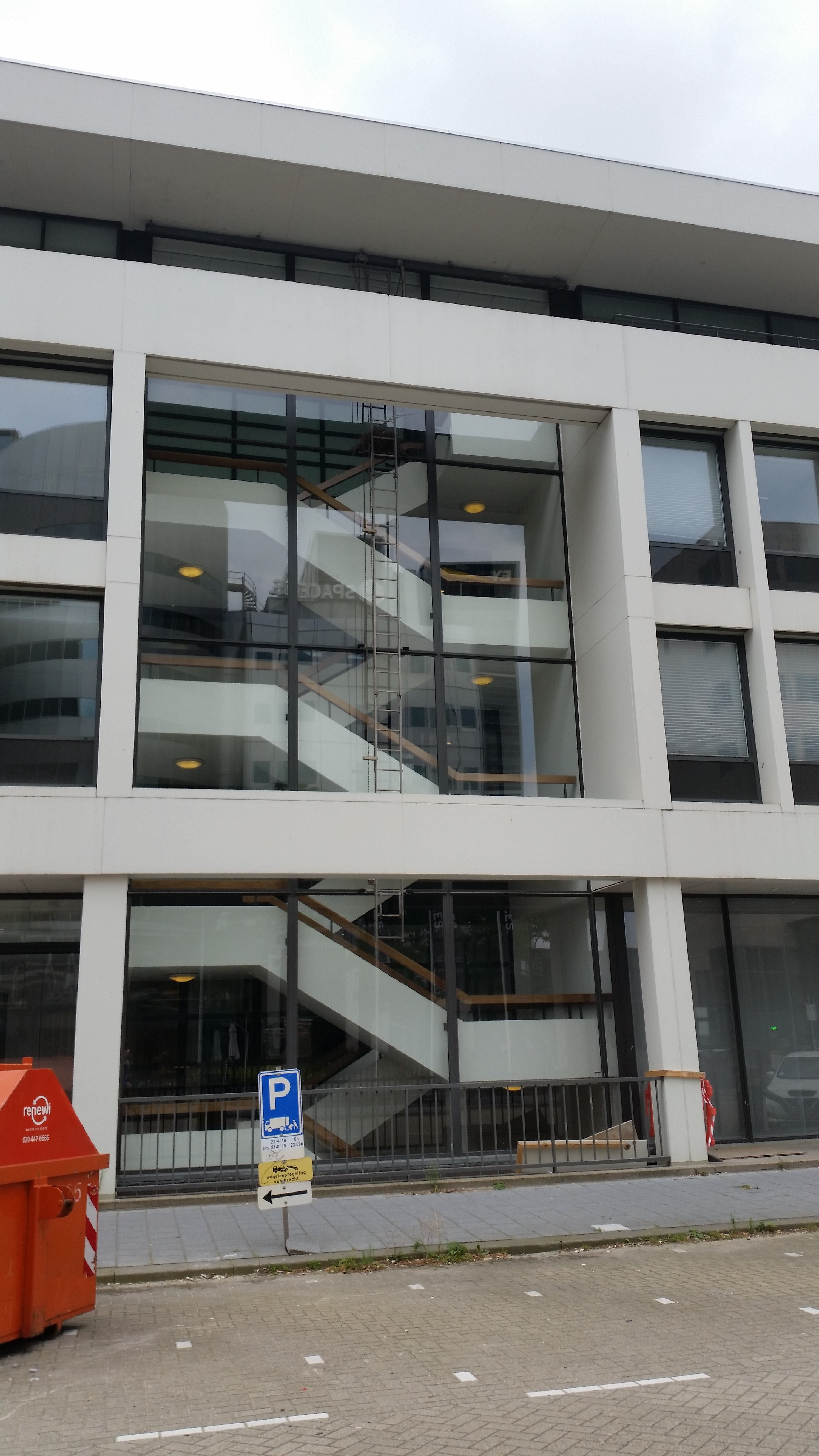 Trappenhuis van Gebouw Vivaldi